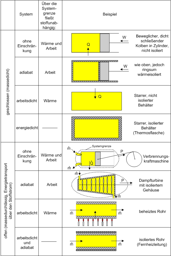 Thermodynamische Systeme, Übersicht